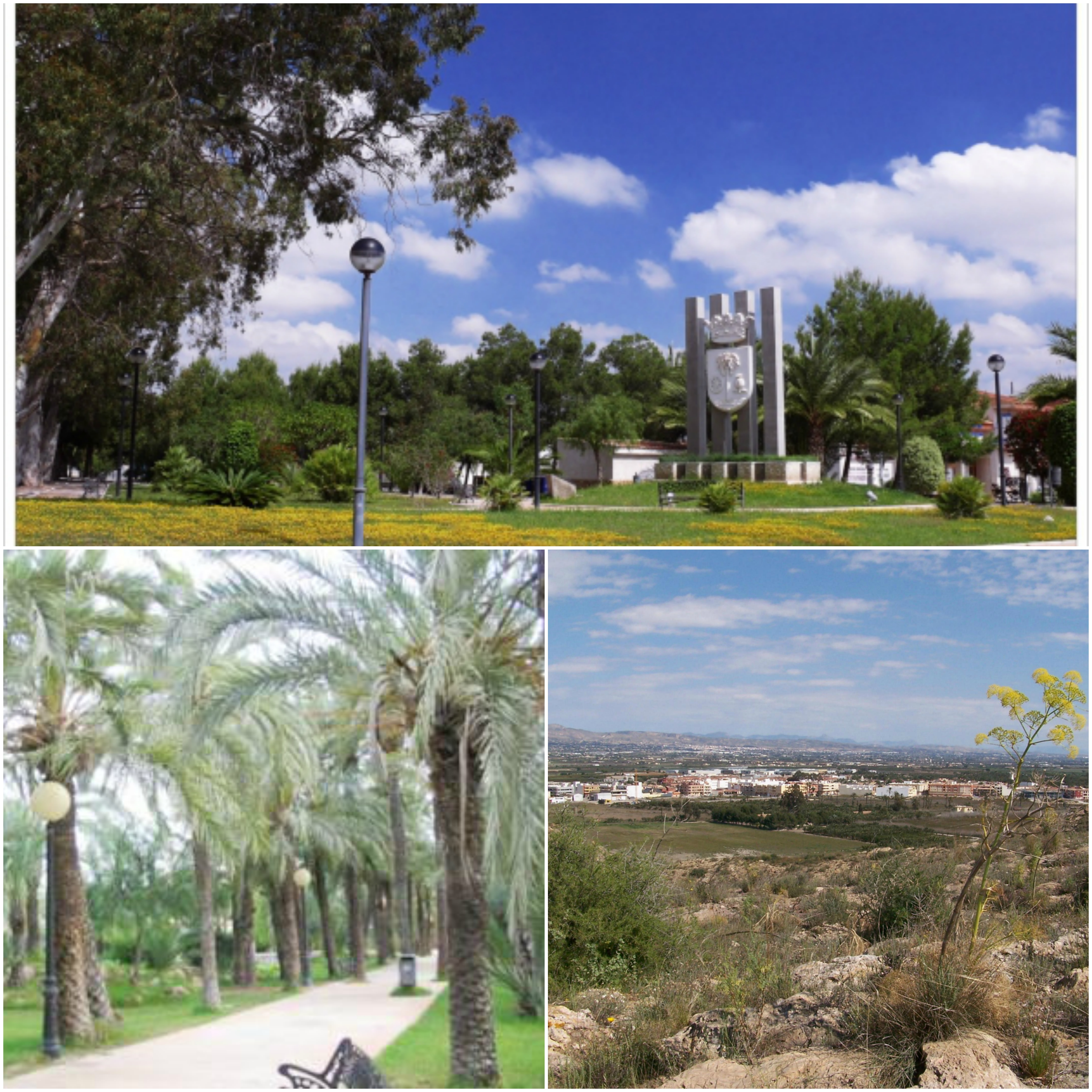 Fotos de San Isidro